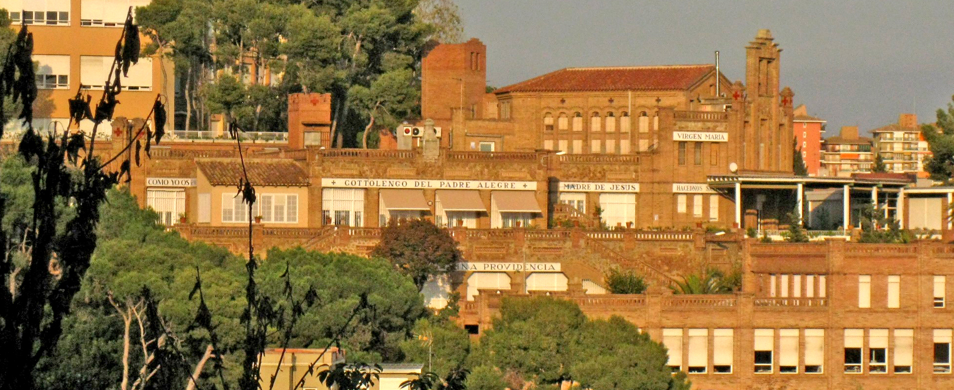 Cottolengo del Pare Alegre, a la carretera del Carmel núm. 19 (al barri de la Salut, Barcelona), vist des de l'avinguda del Santuari de Sant Josep de la Muntanya.